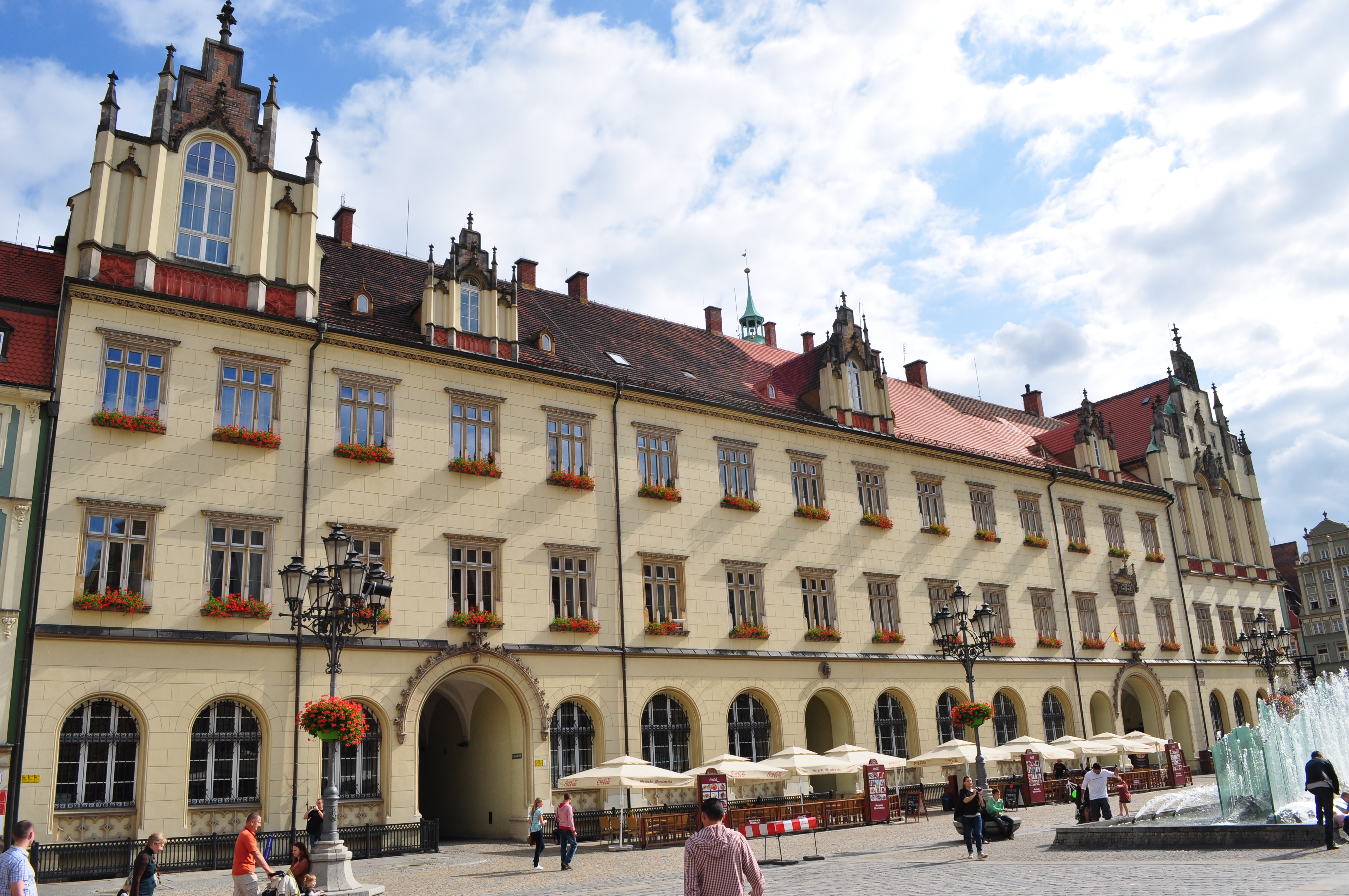 Nowy Ratusz Sukiennice 7-9 (Rynek-Ratusz 3-6), Miasto Wrocław - Stare Miasto